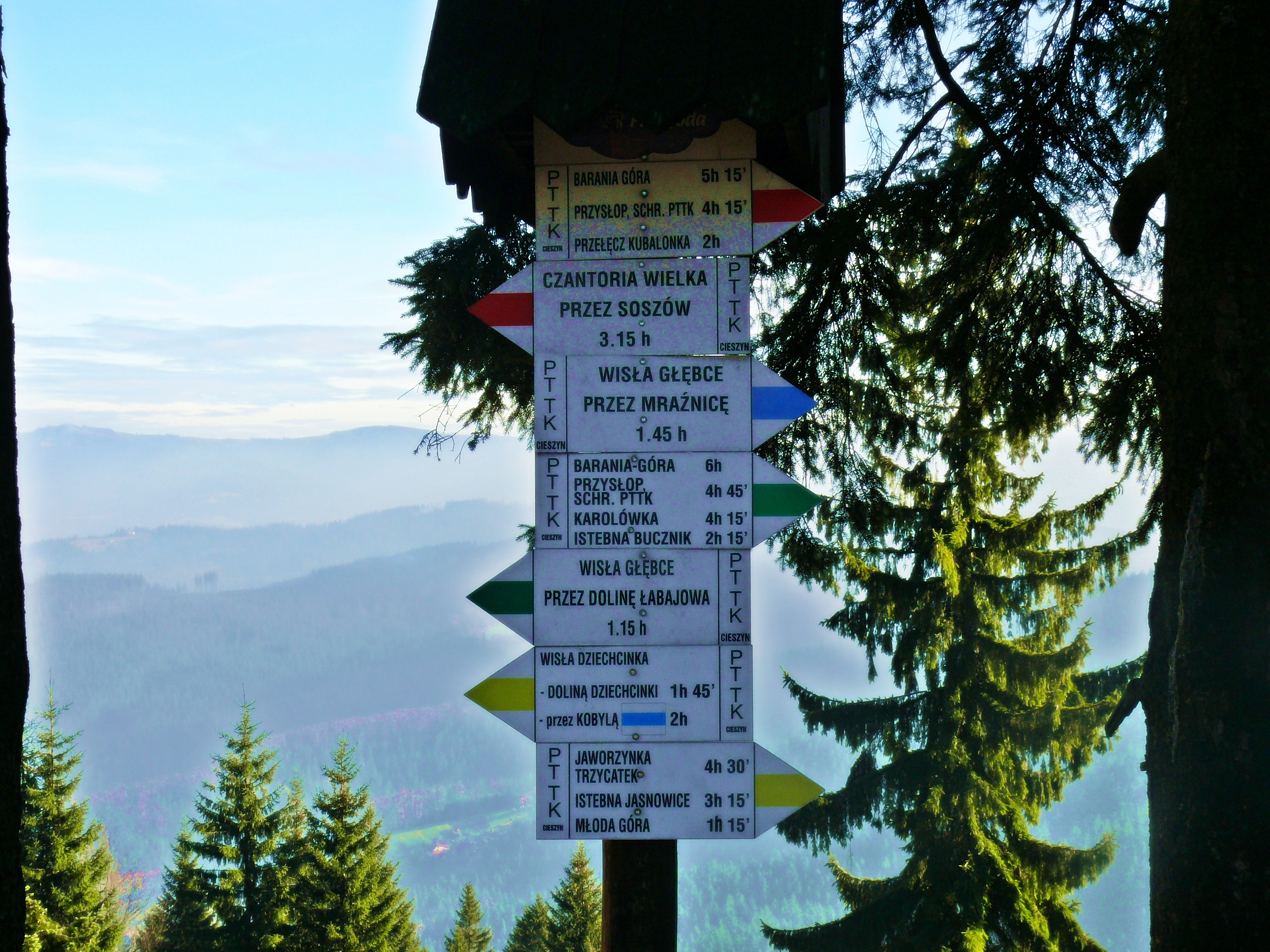 Szlaki turystyczne przy Stożku